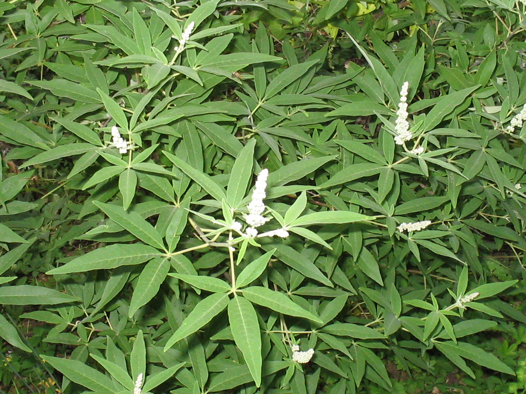 Moenchspfeffer in der Blüte